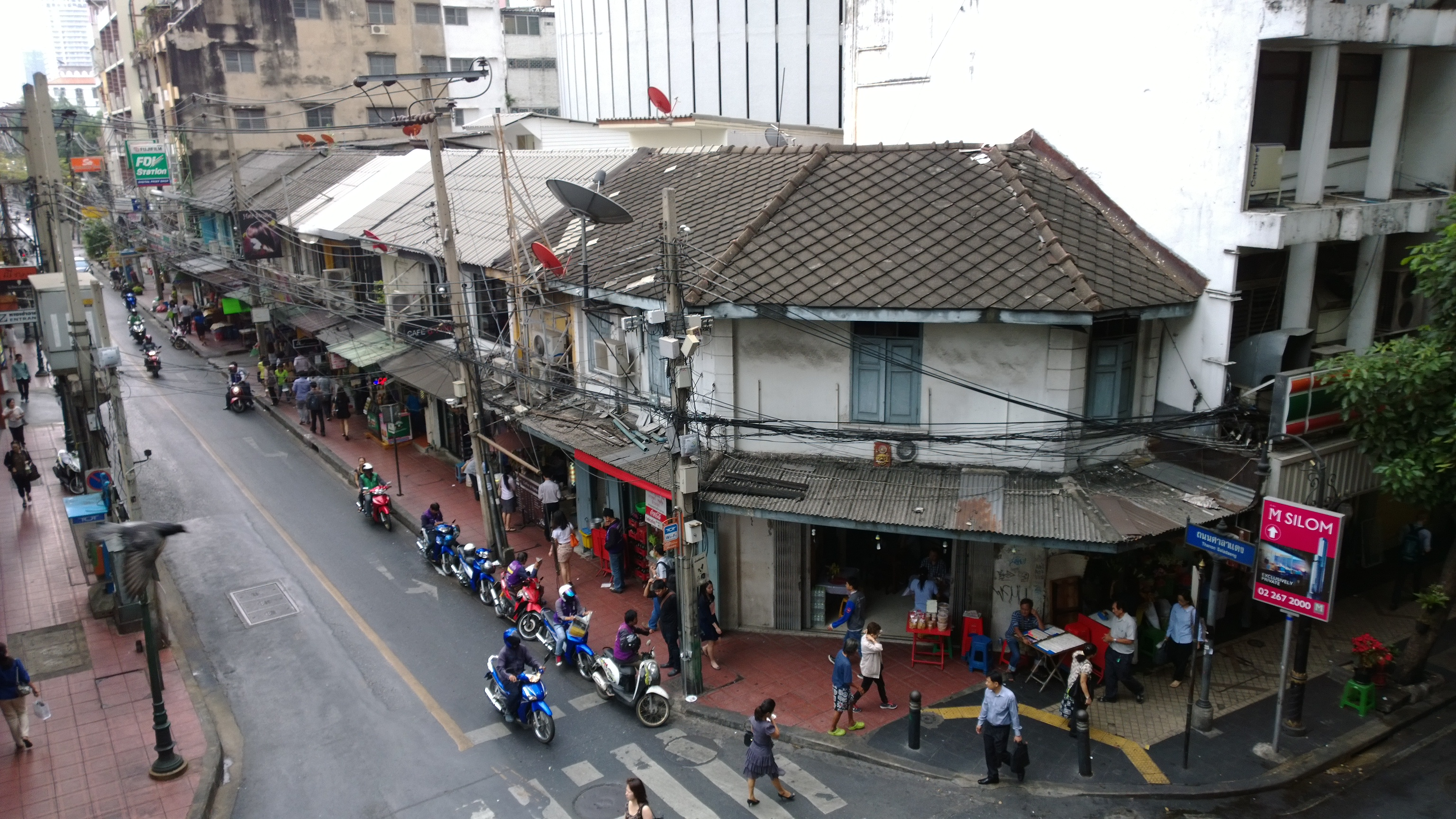 Saladeang road,Silom, Bang Rak, Bangkok, Thái Lan